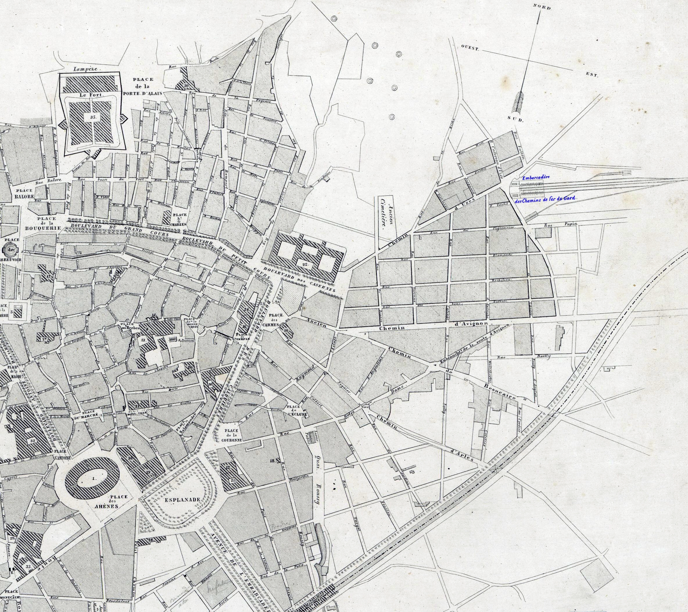 Extrait du plan de Nîmes (1850)